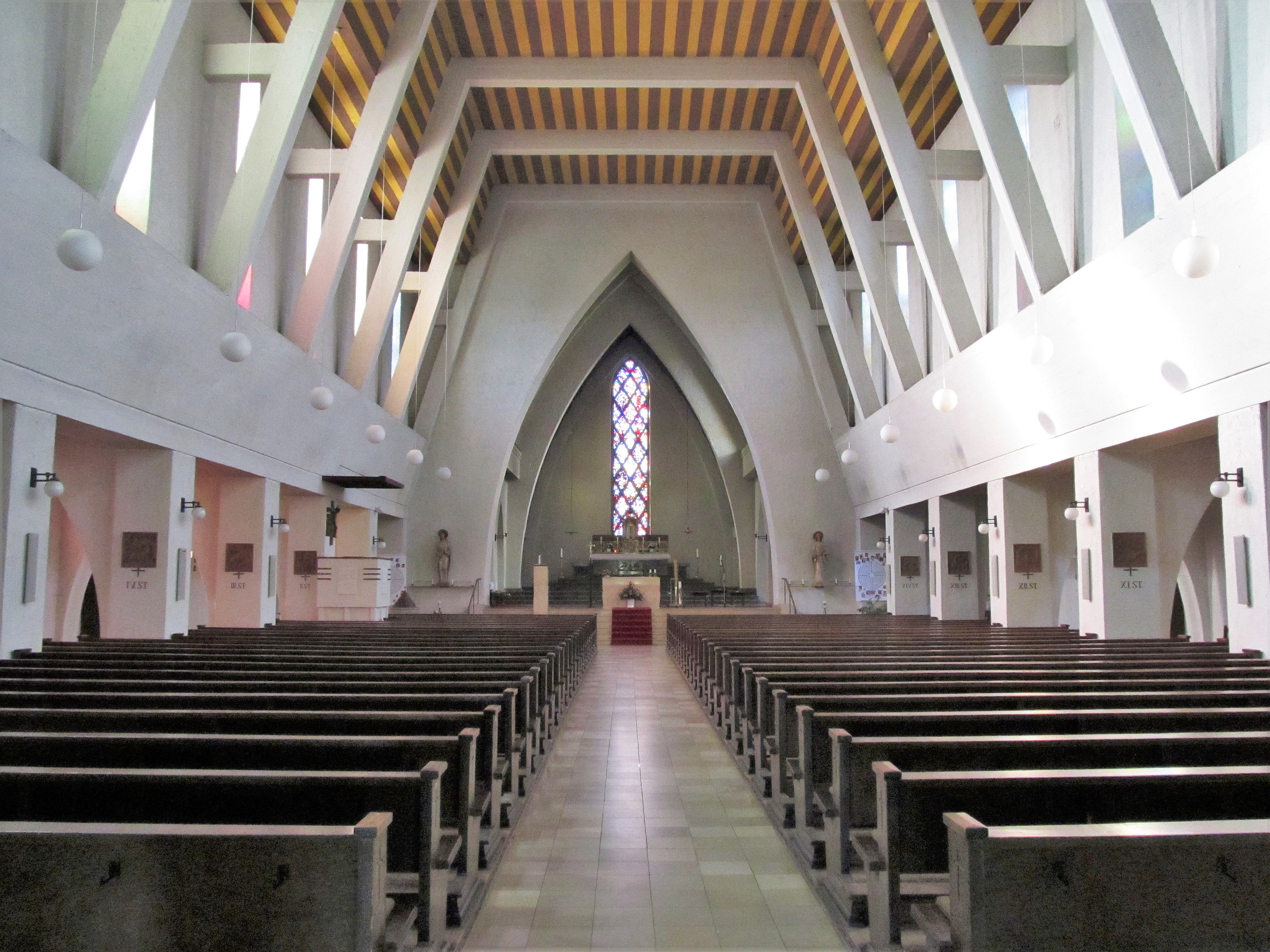 Blick ins Innere der katholischen Pfarrkirche St. Hildegard in St. Ingbert, Saarland